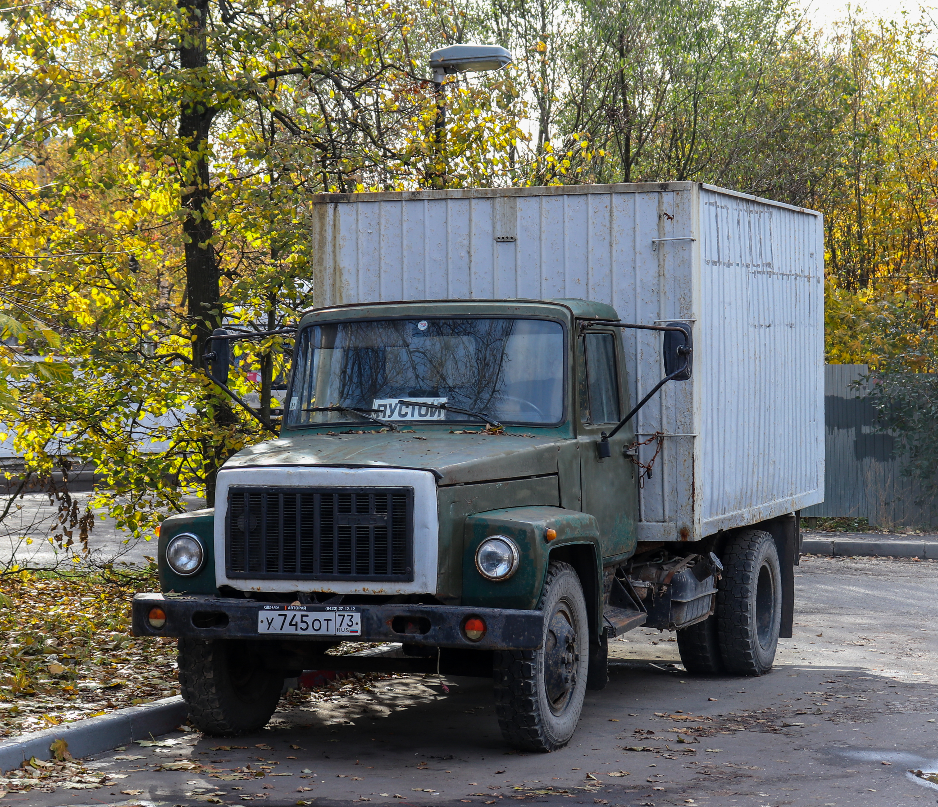 ГАЗ 3307 в городе Московский, Москва